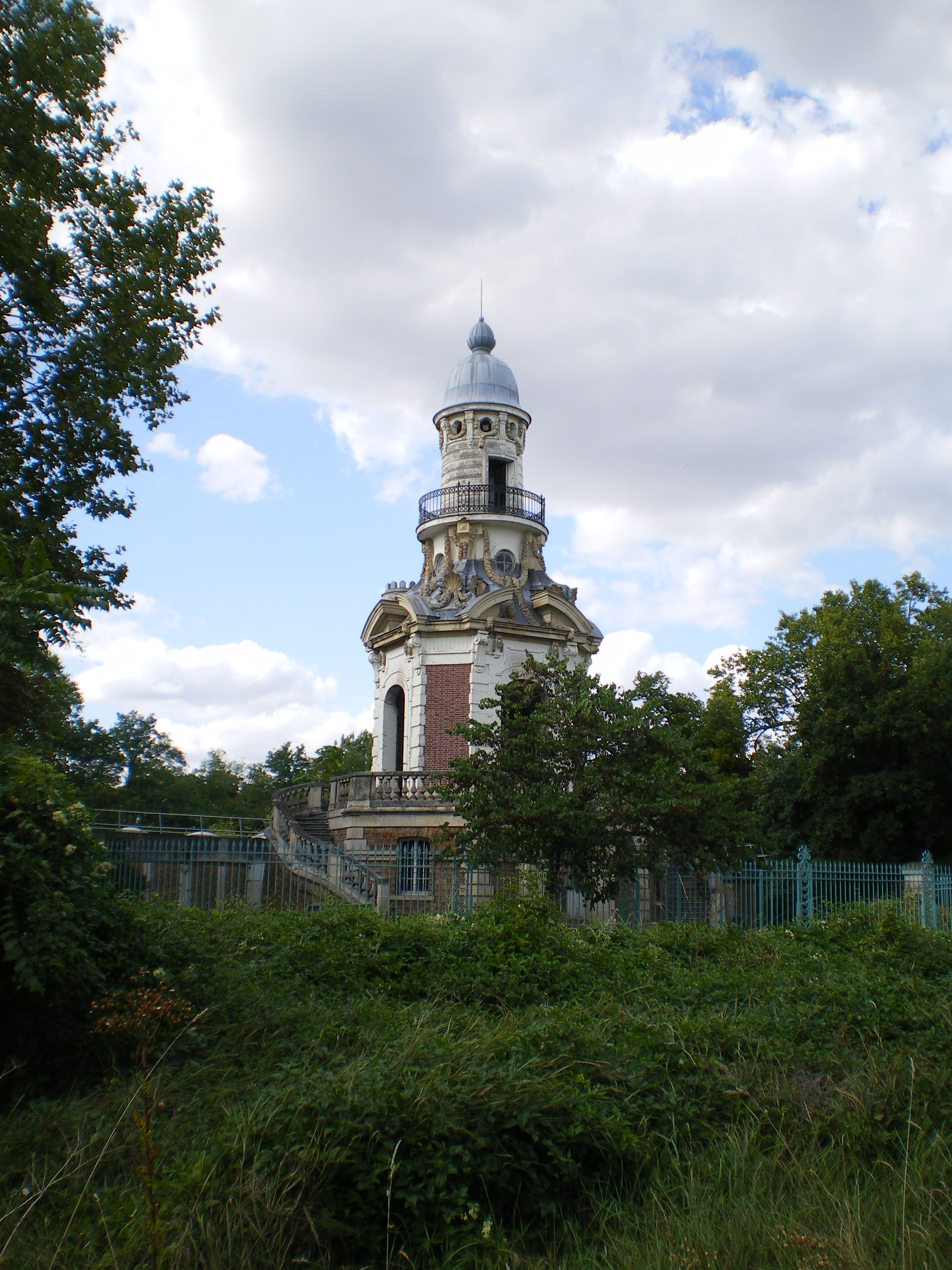 Bagatelle, la pompe à feu du XIXe siècle